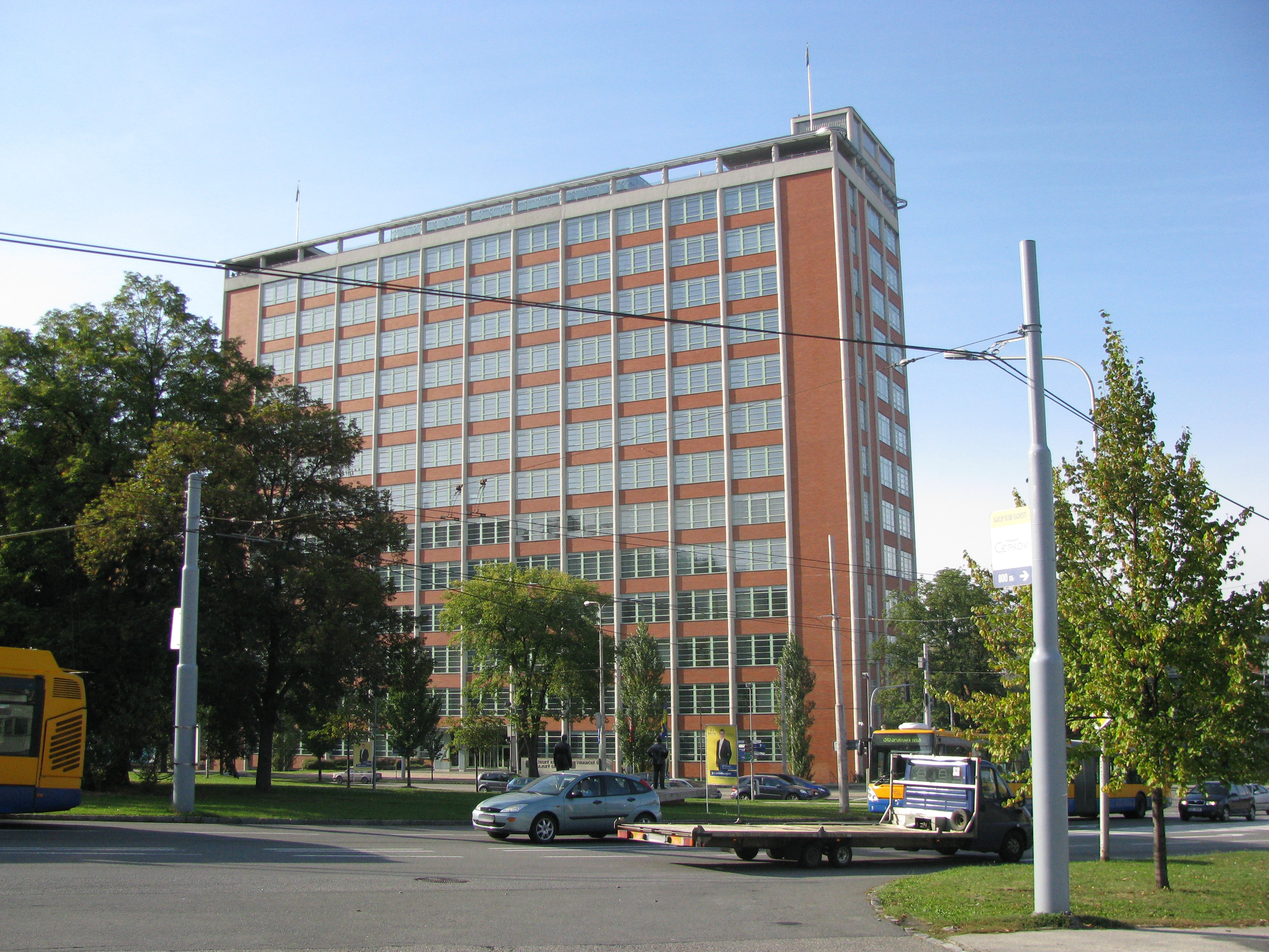 Jiná správní stavba - Baťův mrakodrap (Zlín), Zlín 21